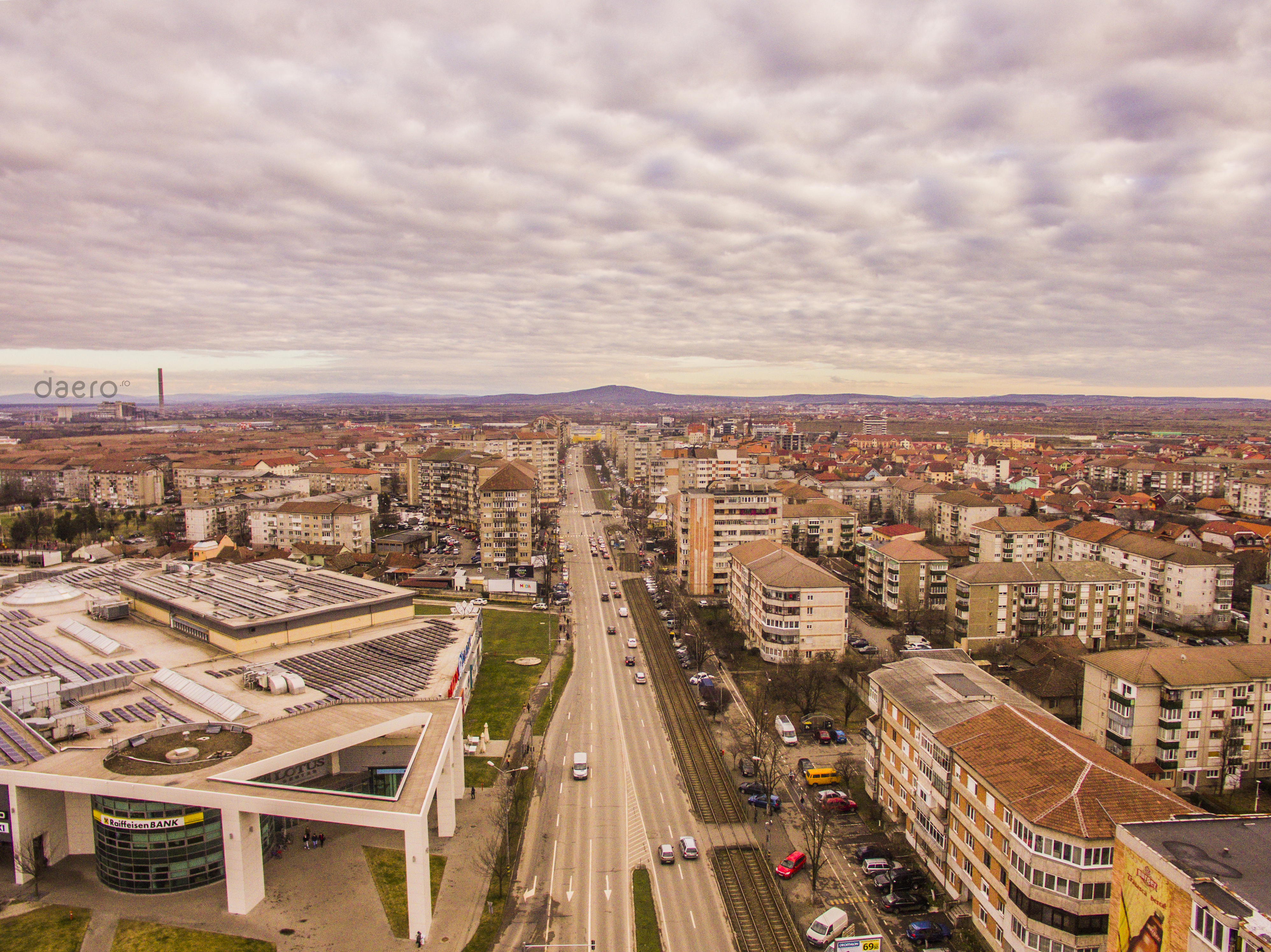 Vedere de ansamblu a cartierului Nufarul